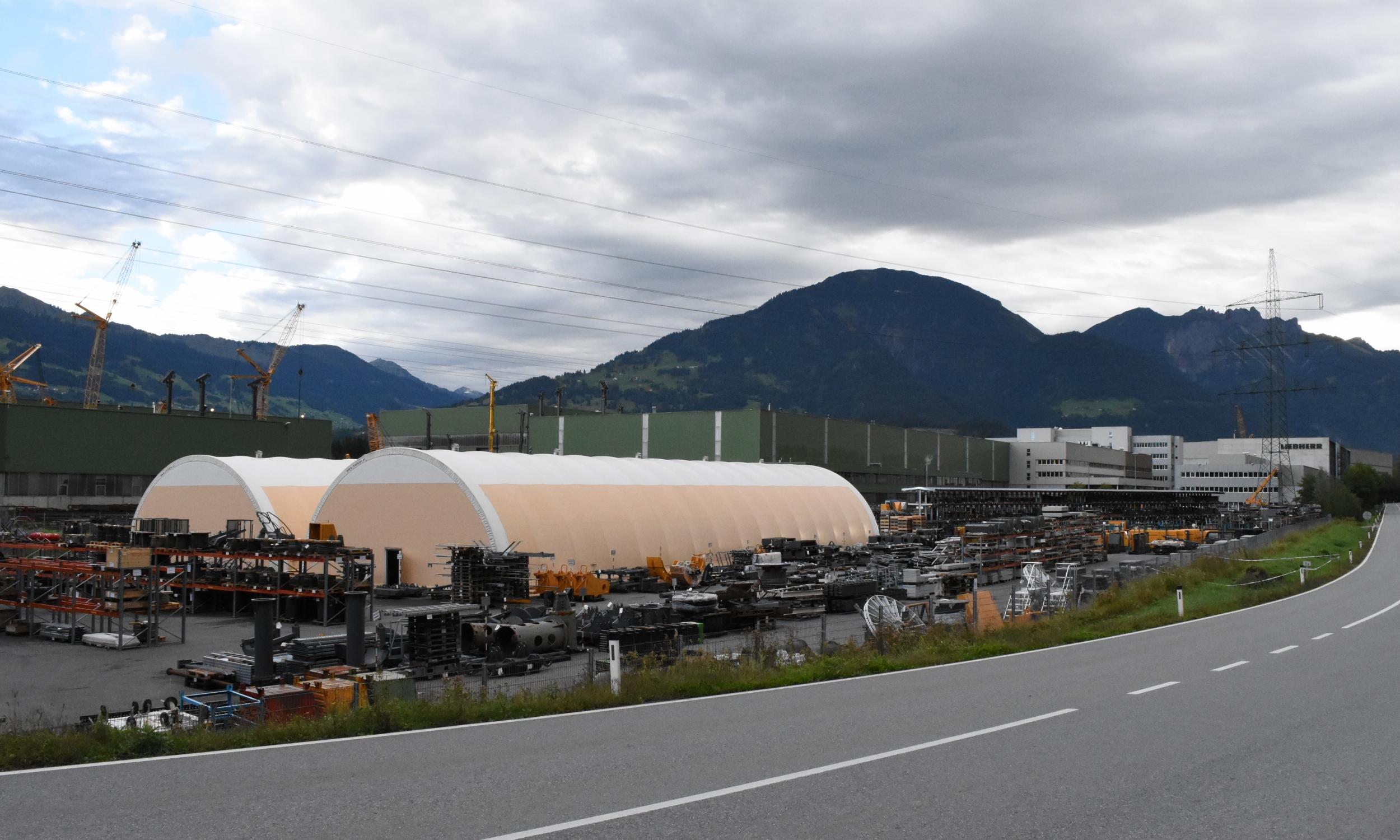 Liebherr-Werk in Nenzing/Österreich